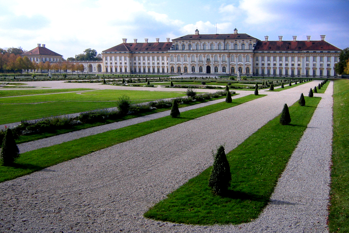 Neues Schloss Schleißheim - Panorama Ostfront Aufnahme mit Canon Digital Ixus II am 06.10.2007